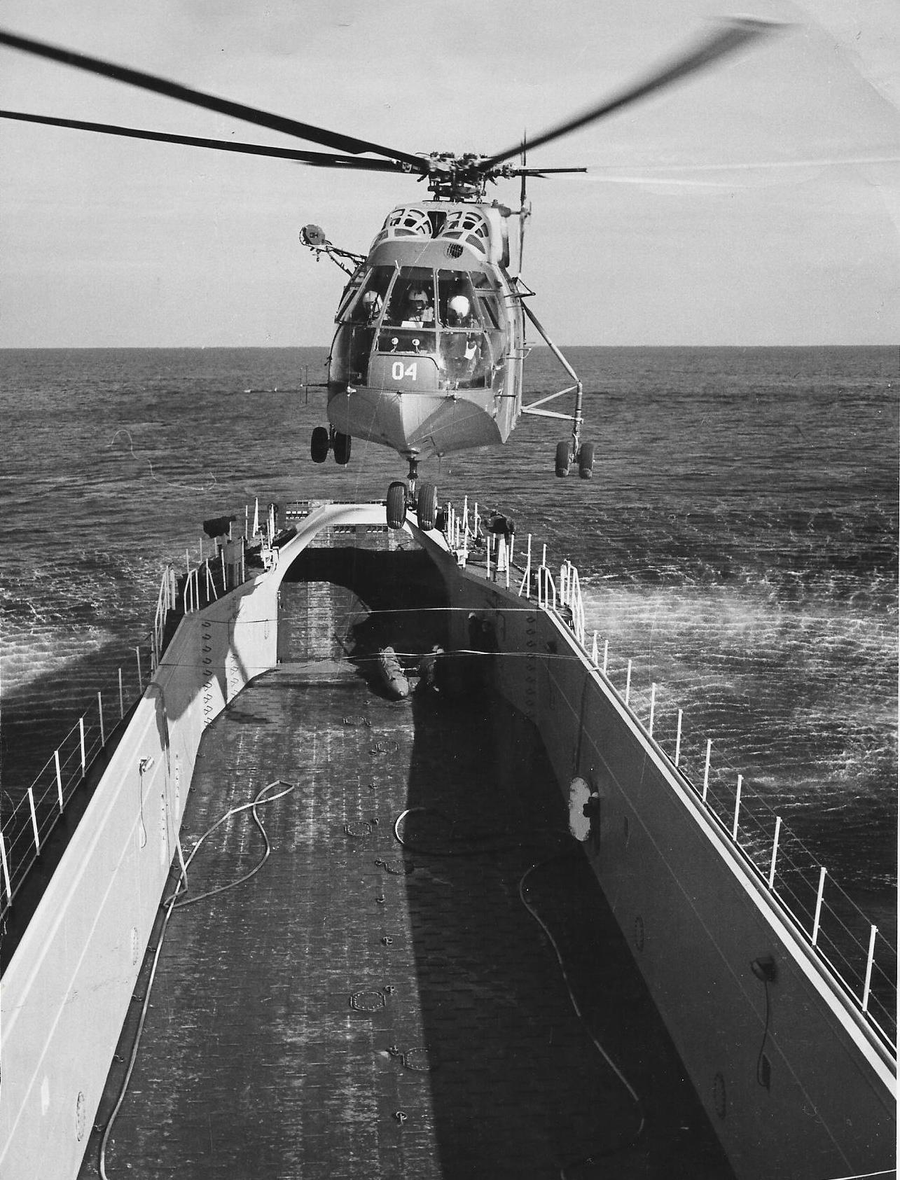 מסוק מעביר אנשים וציוד מחרטום נחתת 60 מטר